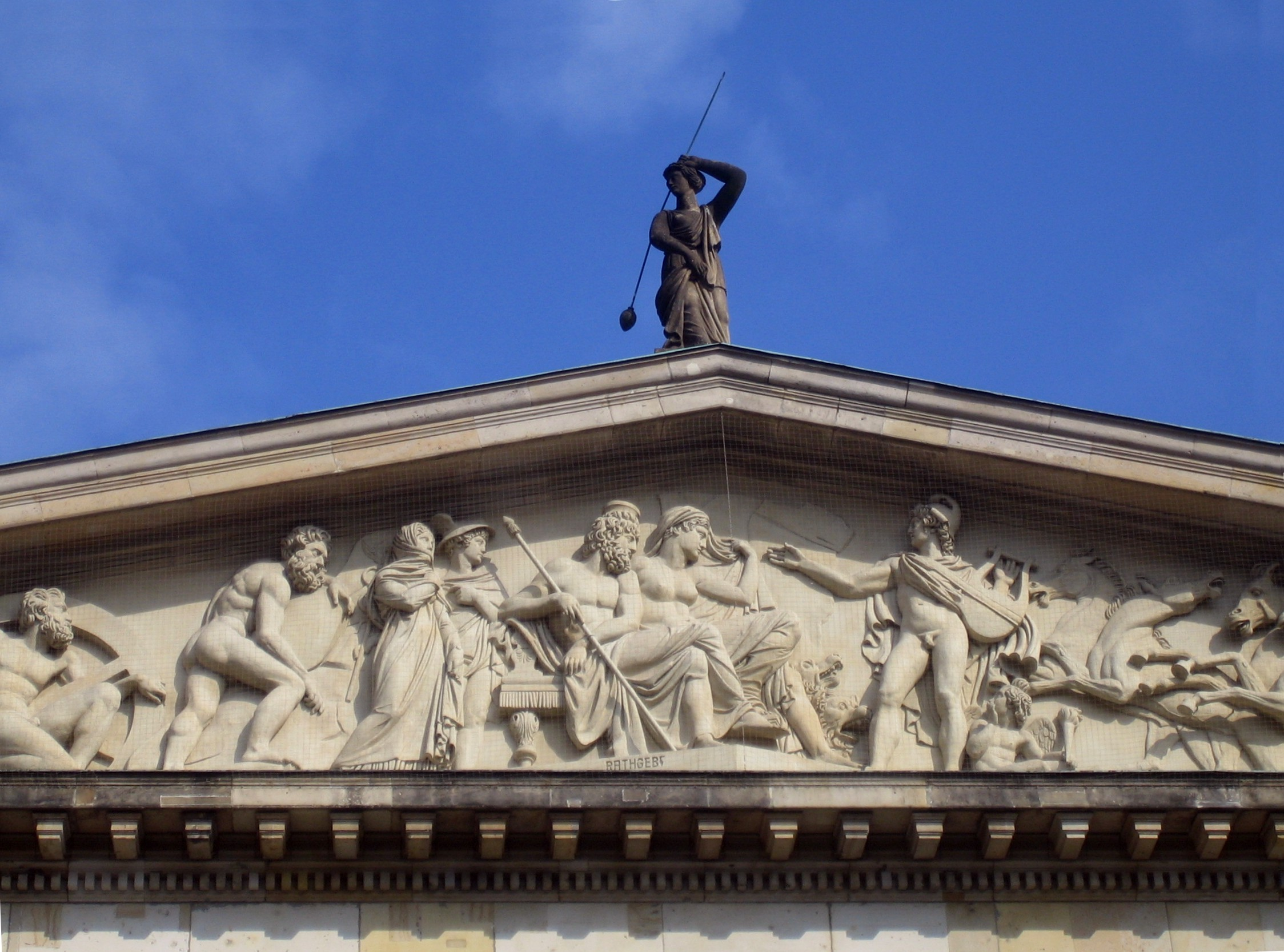 Konzerthaus Berlin, Giebel-Figur